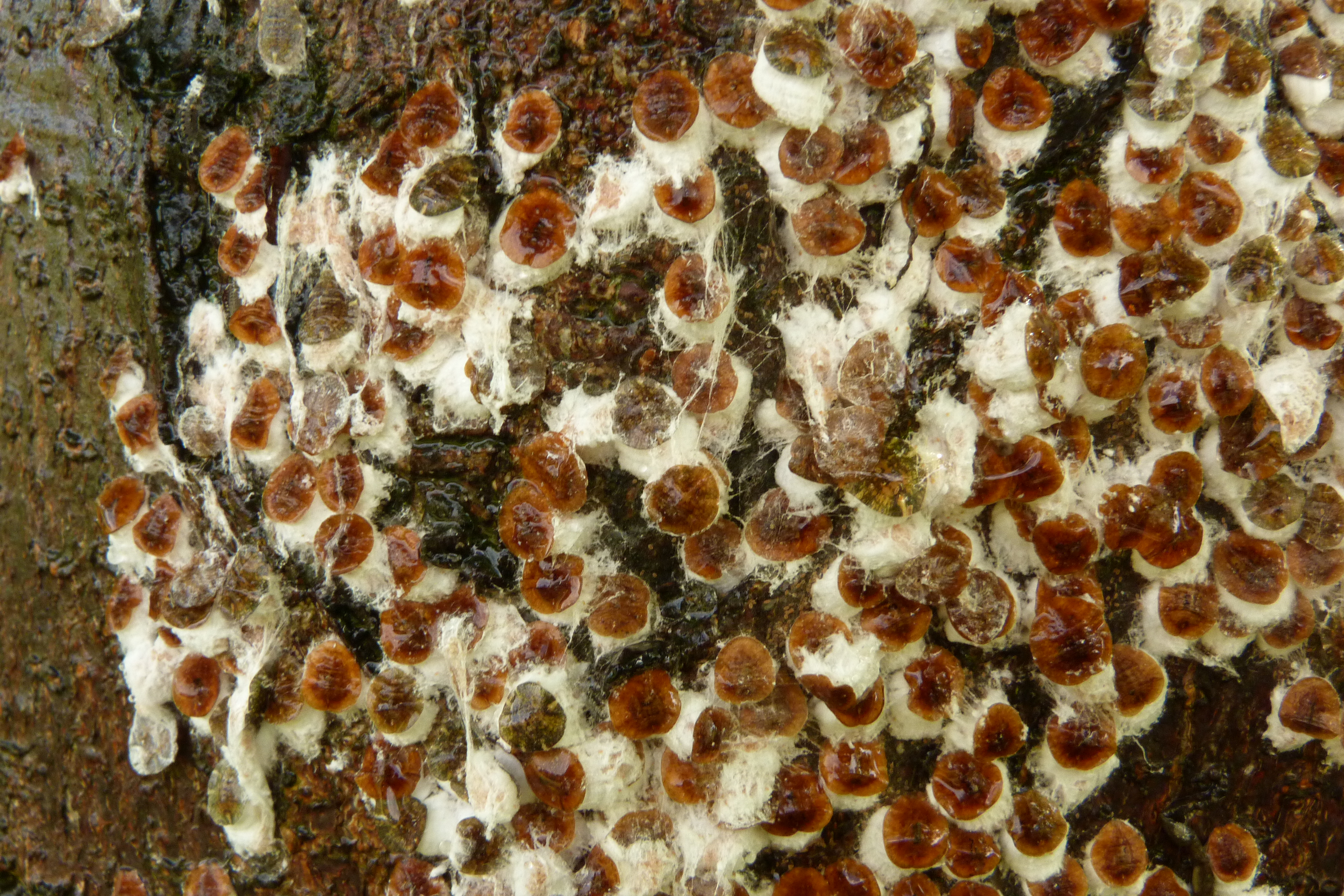 Pulvinaria regalis